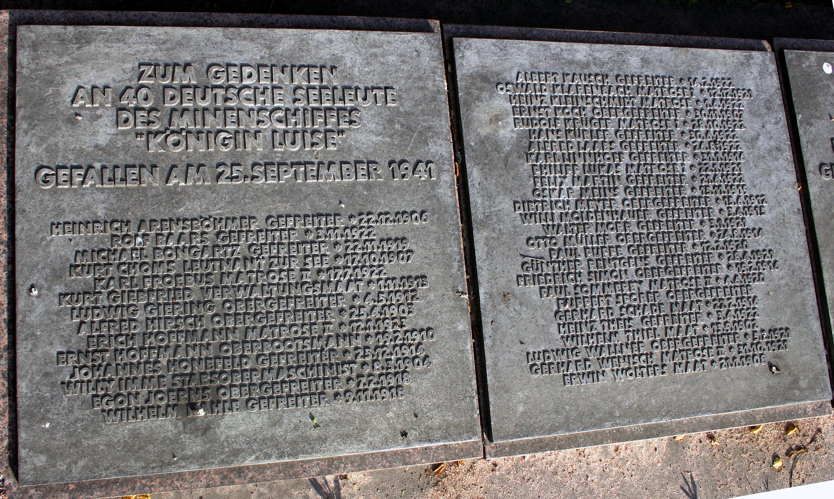 Saksalaisen miinalaiva m/s Königin Luisen miehistön muistokivi Hietaniemen hautausmaalla